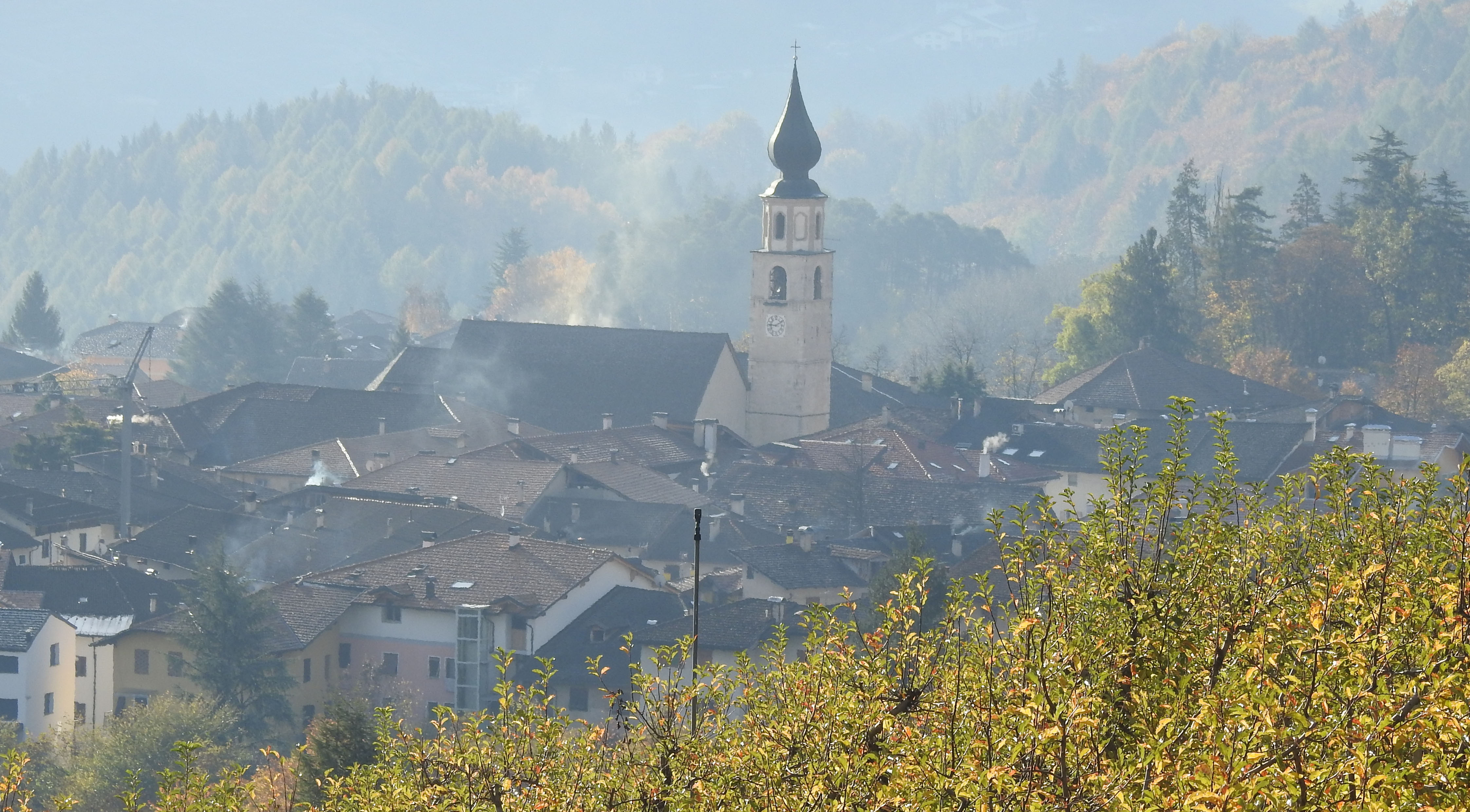 Denno, Trentino, da nord